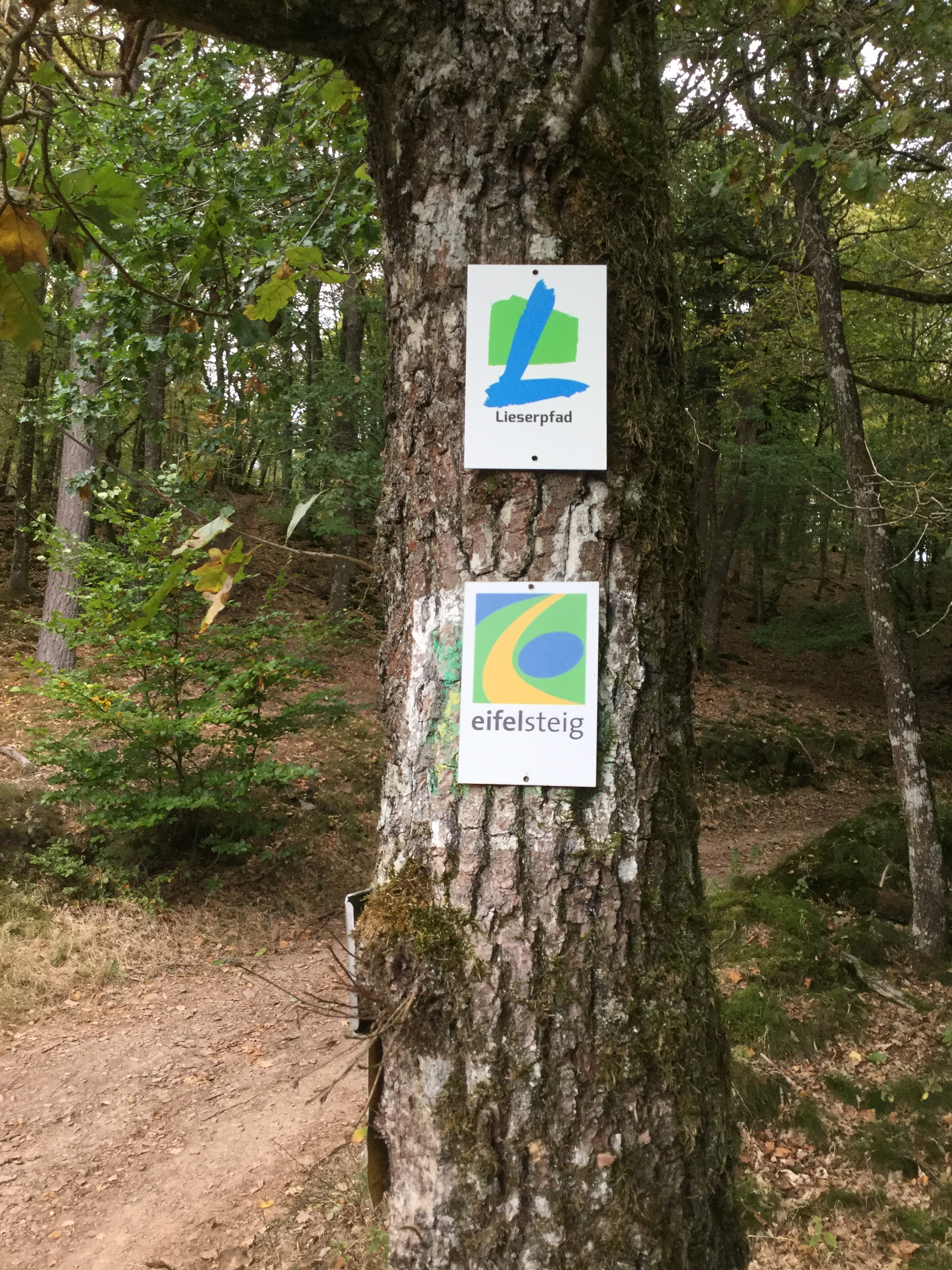 Typische Wandermarkierung (Aktuelle 2016).